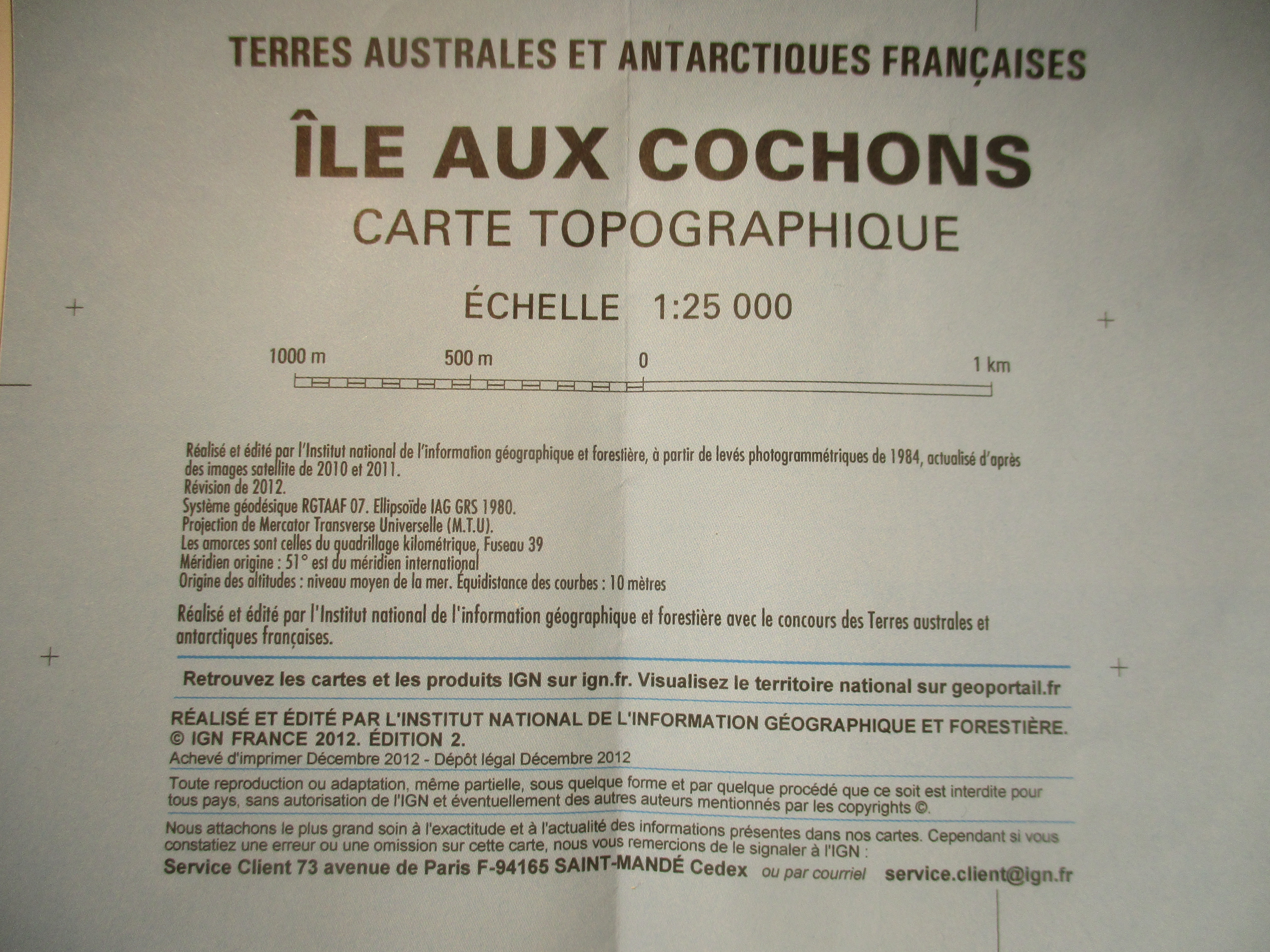 description de la carte 4450C par IGN, avec l'historique de la carte